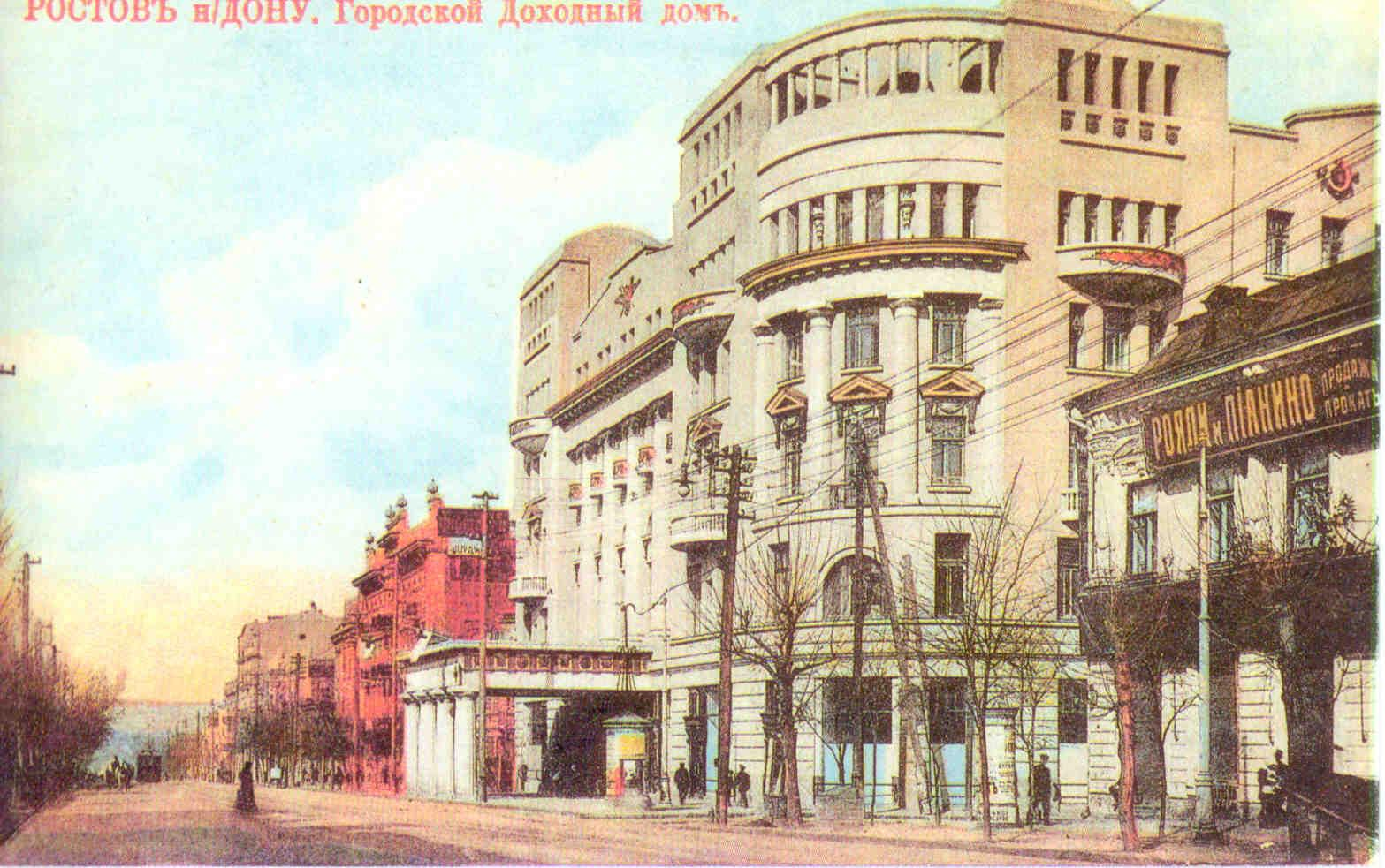 Городской доходный дом. Ростов-на-Дону. Открытка из серии "Приветъ изъ Ростова на Дону. Вдоль Большой Садовой".